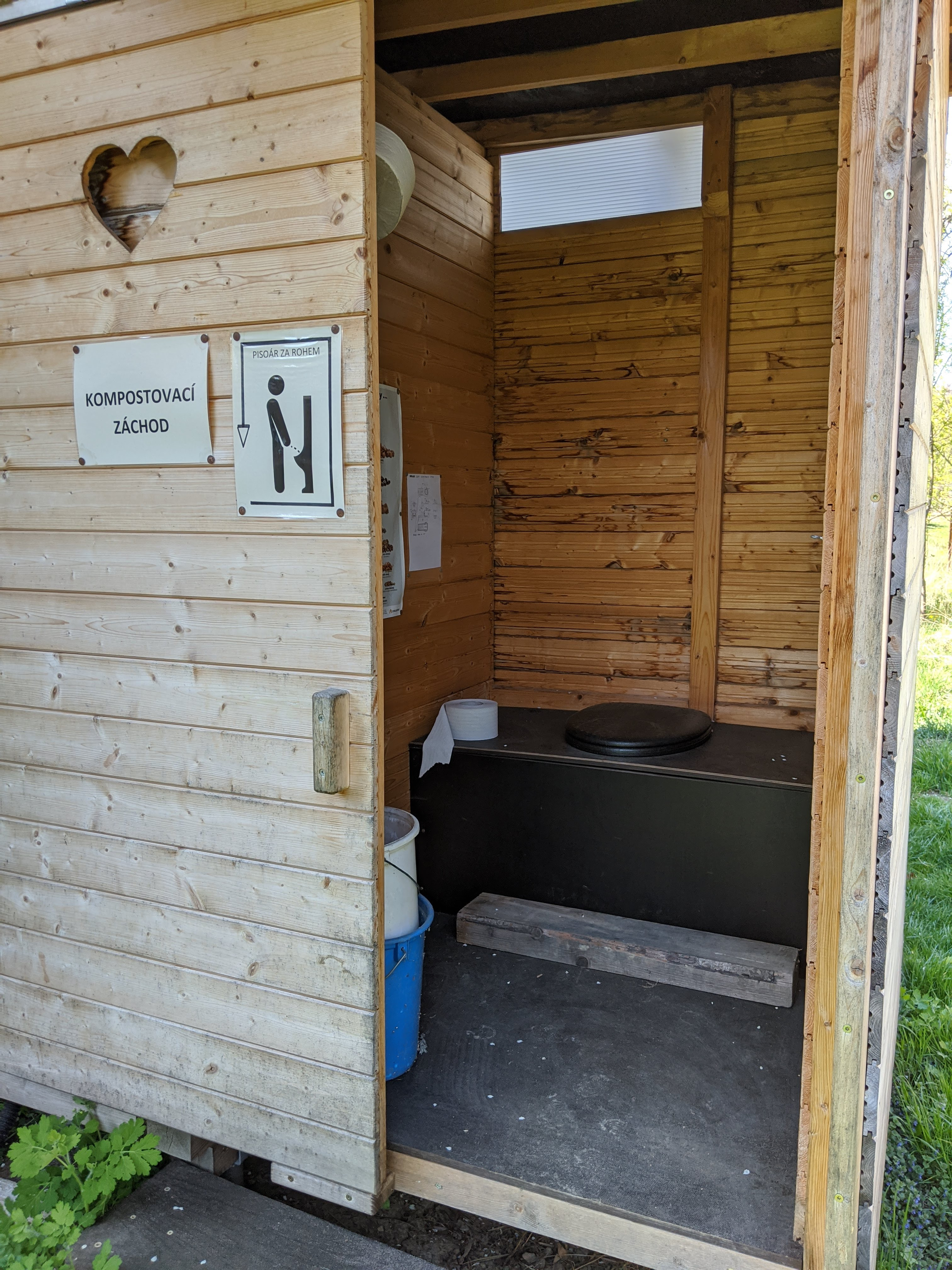 Kompostovací toaleta u Centra Veronica v Hostětíně